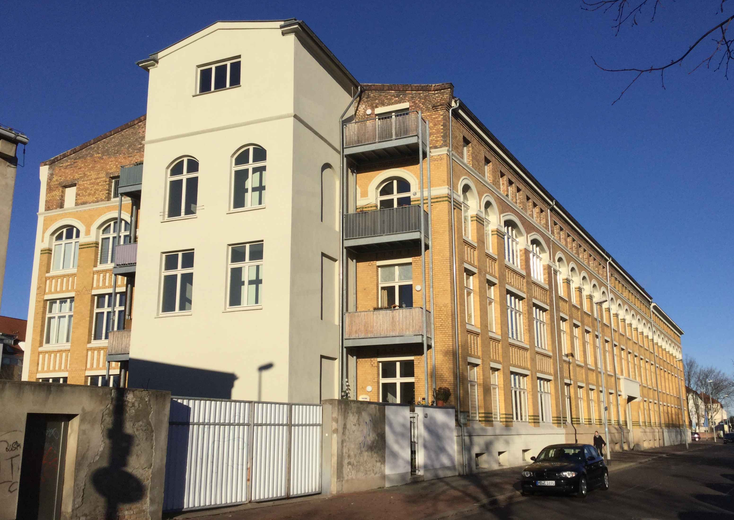 ehemaliges Fabrikgebäude in Magdeburg, Neue Neustadt, Nachtweide 36-43; erbaut 1902-1903 für die Hugo Bestehorn Werke für Papierverarbeitung Magdeburg; unter Denkmalschutz